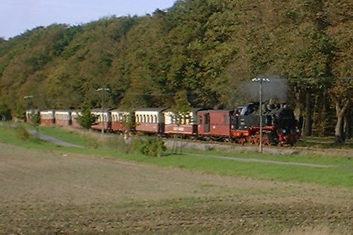 Beschreibung: Der Molli zwischen Heiligendamm und Bad Doberan Quelle: selbst fotografiert Fotograf: Doris Antony, Berlin Datum der Aufnahme: 17.09.2003 Lizenzstatus: Doris Antony put it under the GFDL and CC-BY-SA-2.5 from de.wikipedia [1] 18:16, 7. Mär 2005 . . DorisAntony (Diskussion) . . 506 x 337 (153172 Byte) (Molli)